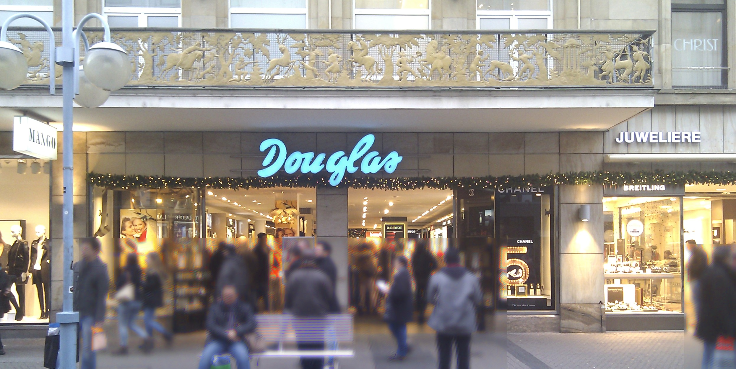 Geschäfte Mannheim P5